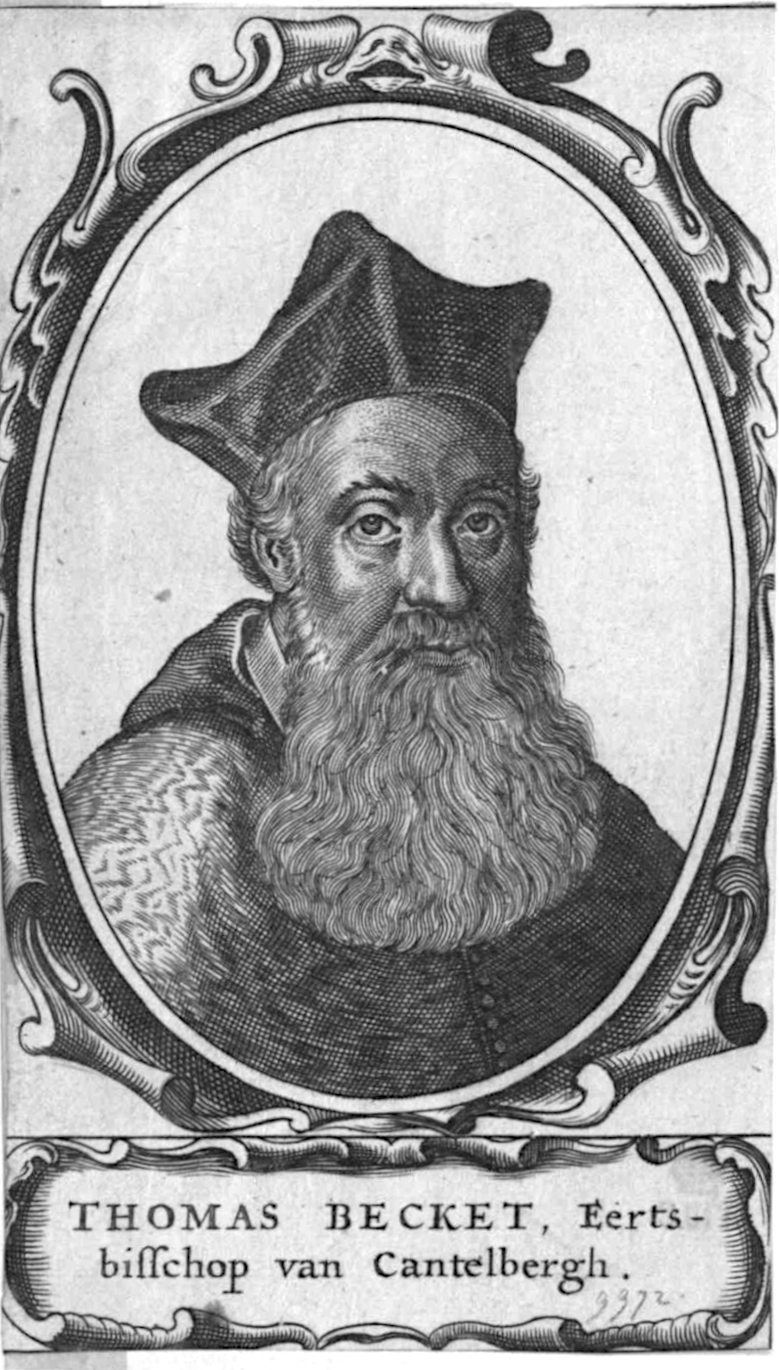 Becket, Thomas (um 1118 - 1170)